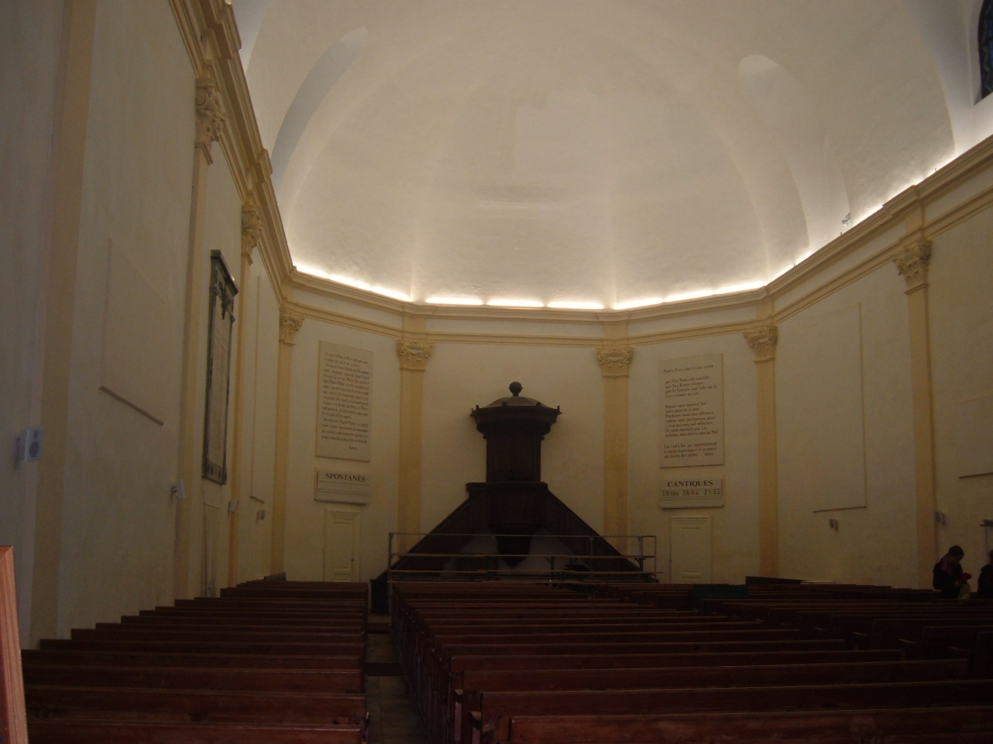 Temple réformé de la rue du Hâ, il s'agit de la première chapelle de la Compagnie de Notre-Dame, fondée par Sainte-Jeanne de Lestonnac en 1607 à Bordeaux, prise par Cédric TARTAUD-GINESTE en avril 2006.